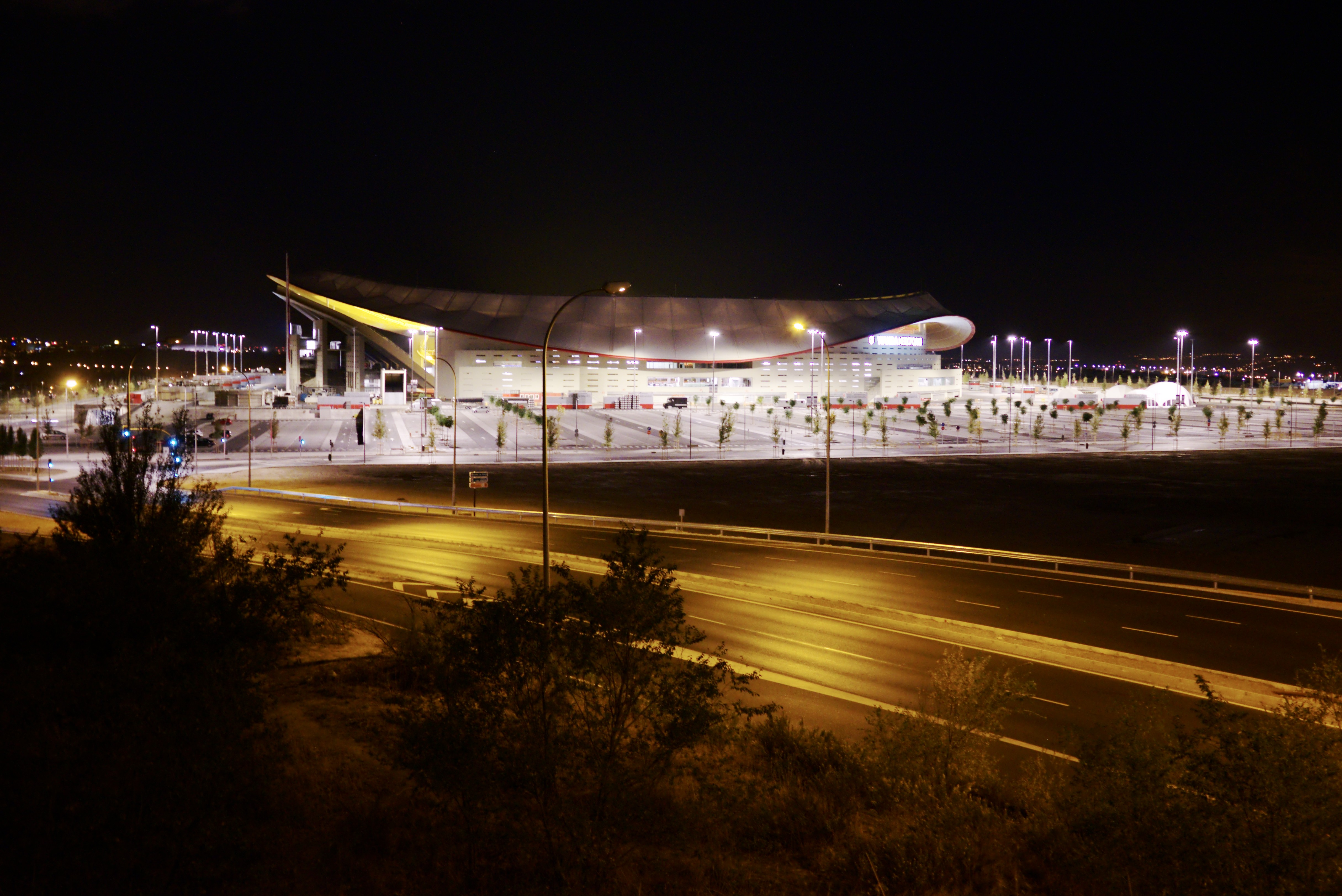 Estadio Metropolitano (Madrid)